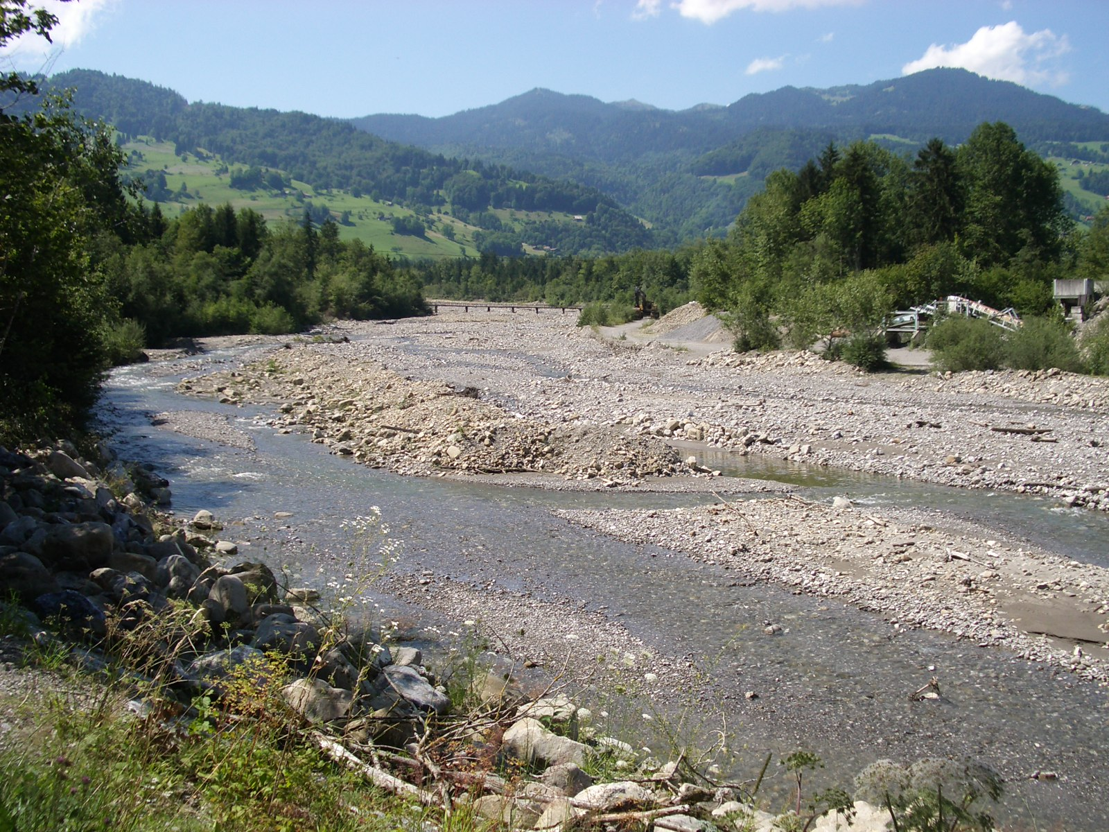 Lauibach bei Giswil OW, Switzerland